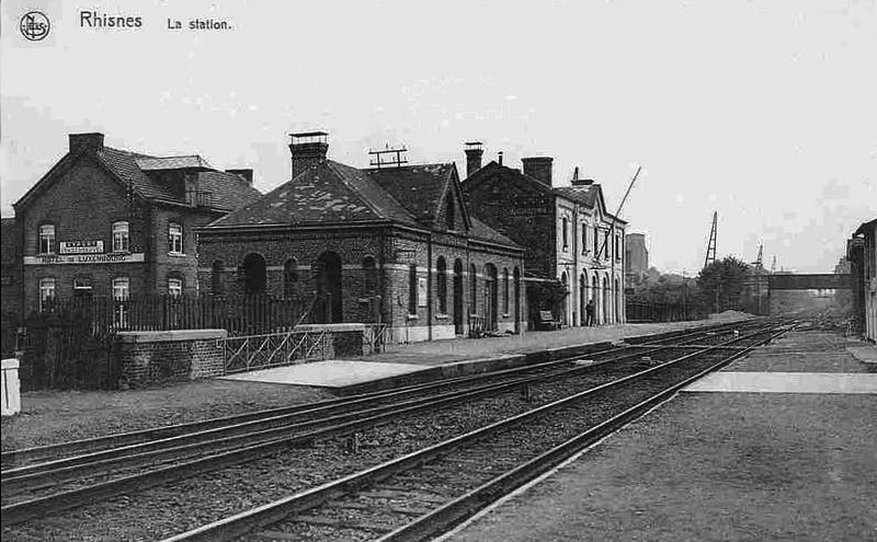 La gare de Rhisnes au début des années 1900.